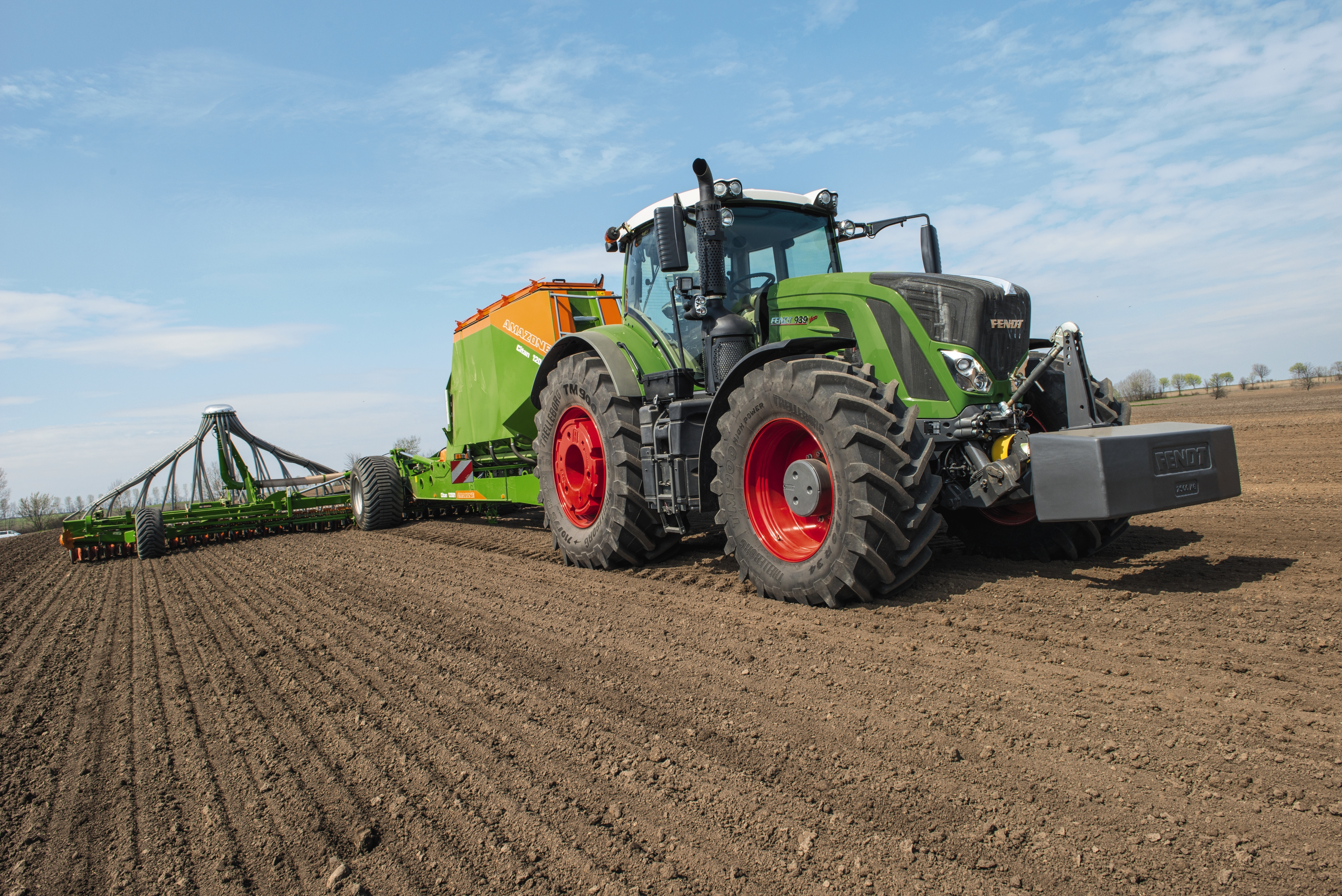 Fendt 939 Vario mit einer Großflächen-Sämaschine von Amazone